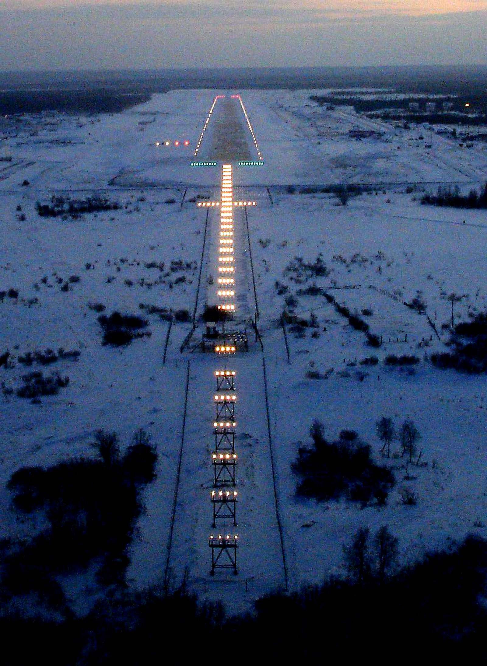 Огни впп